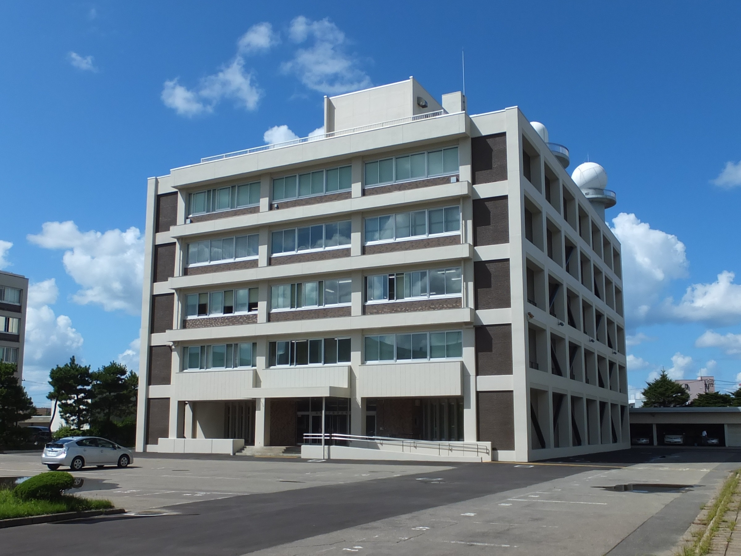 秋田法務合同庁舎（秋田市山王）